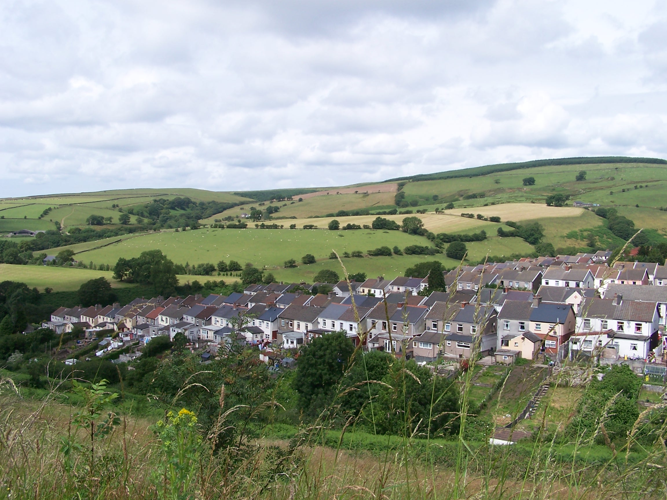 View of Gilfach Goch, in Rhondda Cynon Taff, South Wales, UK